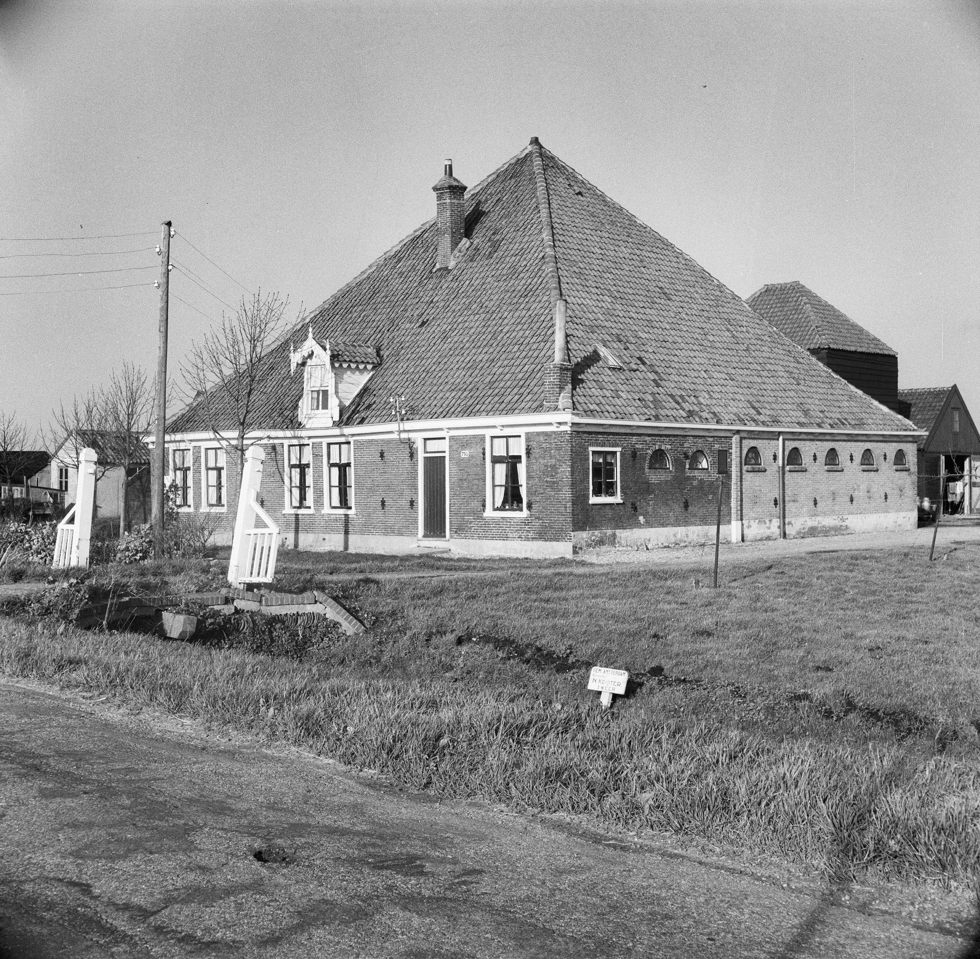 voor- en linker zijgevel